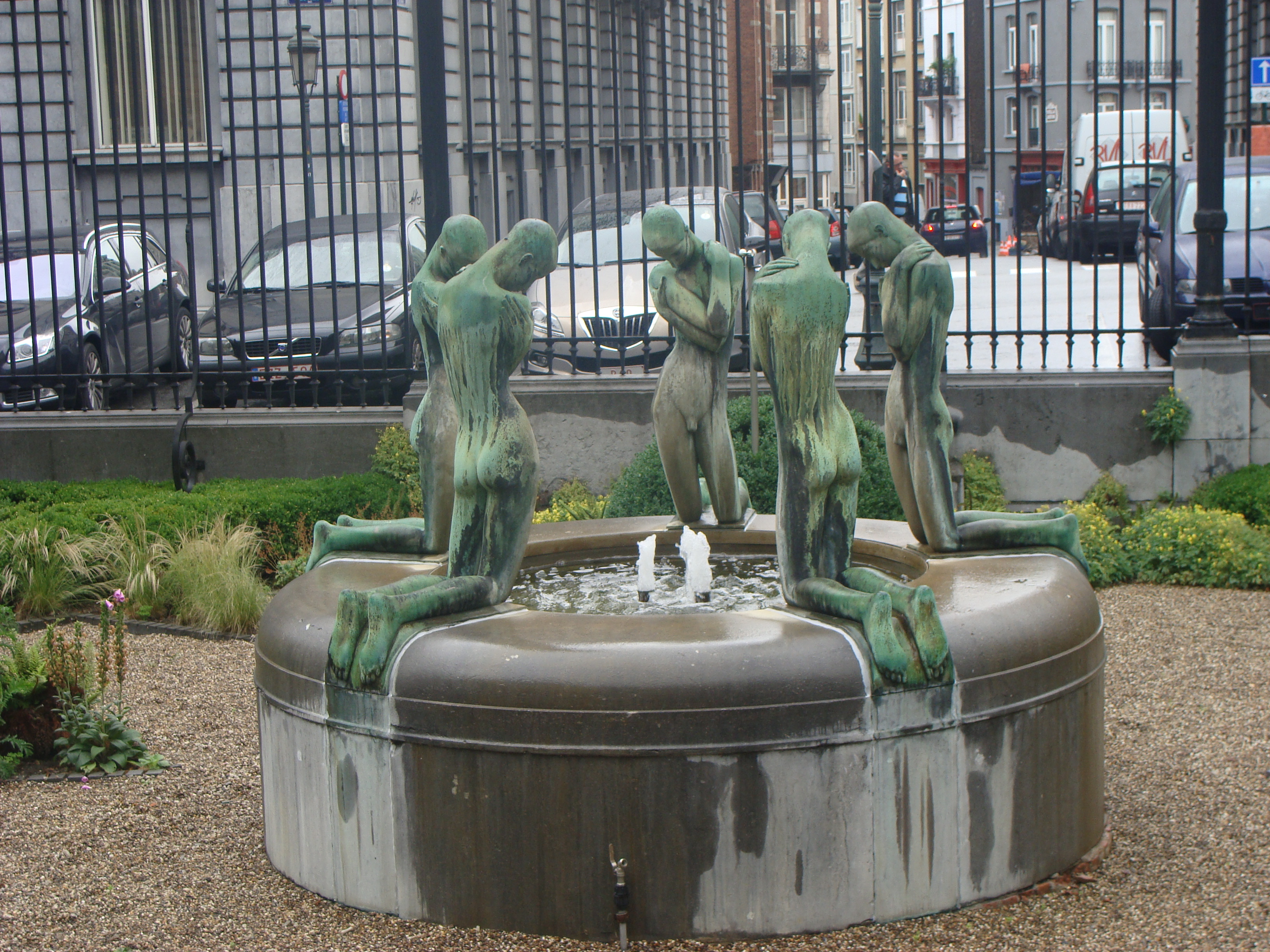 George Minne, De Knapenfontein, Brussel